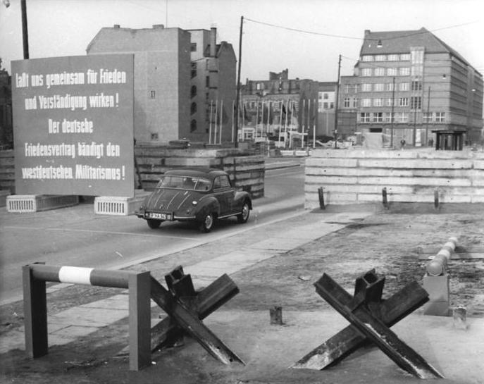 ADN-ZB-Stöhr-13.12.1961-Berlin: Grenzkontrollpunkt Friedrichstraße. Information added by Wikimedia users.Text on the propaganda billboard: "Laßt uns gemeinsam für Frieden und Verständigung wirken! Der deutsche Friedensvertrag bändigt den westdeutschen Militarismus!". Eng. translation: "Let us work together for peace and understanding! The German Peace Treaty restrains the West German warmongering!".